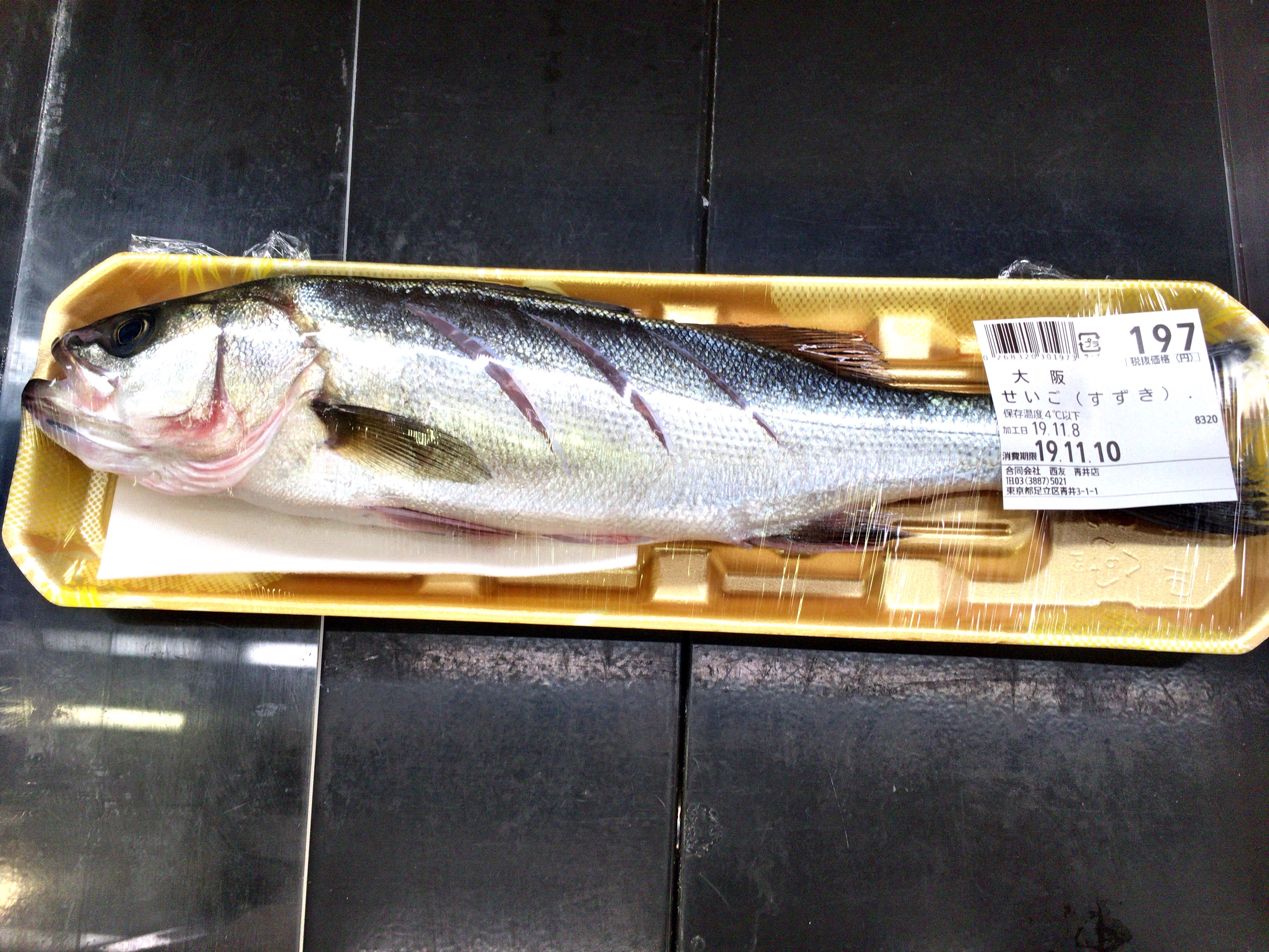 Japanese seabass, also suzuki (鱸) (Lateolabrax japonicus)